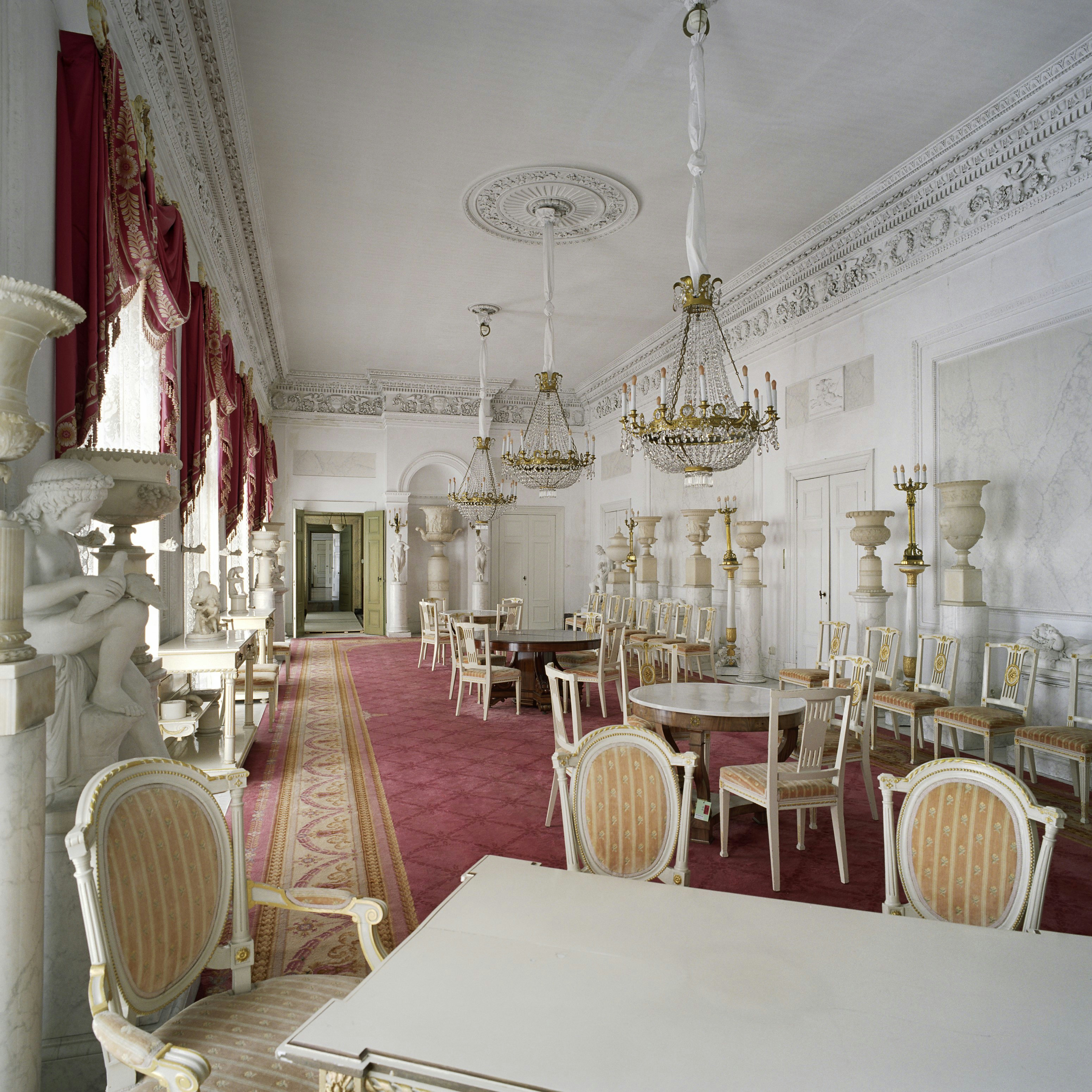 Paleis Soestdijk: Interieur, overzicht van de Witte eetzaal met kroonluchters, meubilair en albasten vazen, gelegen aan de achterzijde van het middengedeelte, tussen het corps de logis en de Soester vleugel